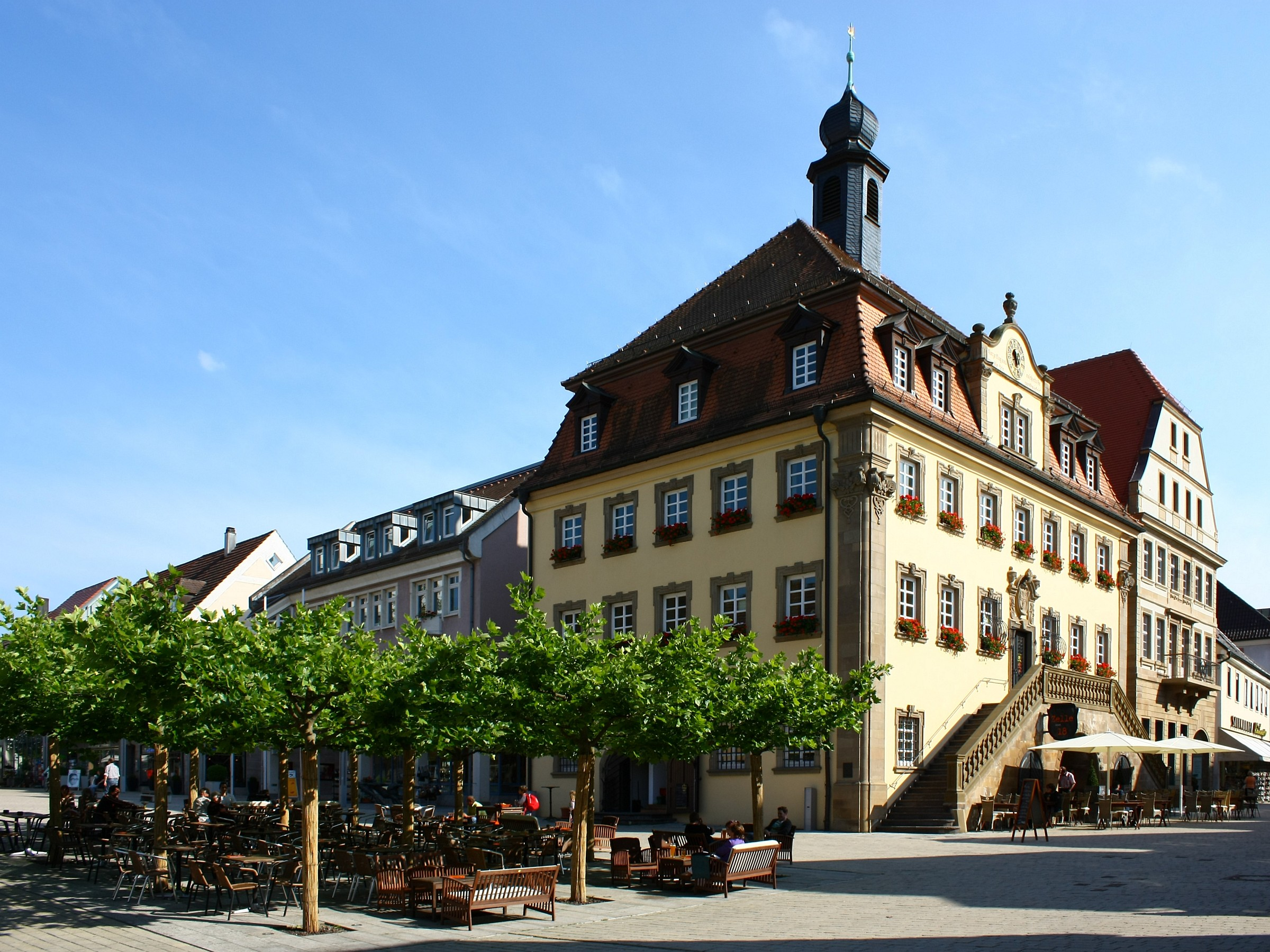 Das Rathaus in Neckarsulm, 1781/1782 von Franz Häffele erbaut, links befindet sich der Erweiterungsbau von 1985, rechts ist der ehemalige Gasthof "Zur Rose", in dem heute das Stadtarchiv untergebracht ist.